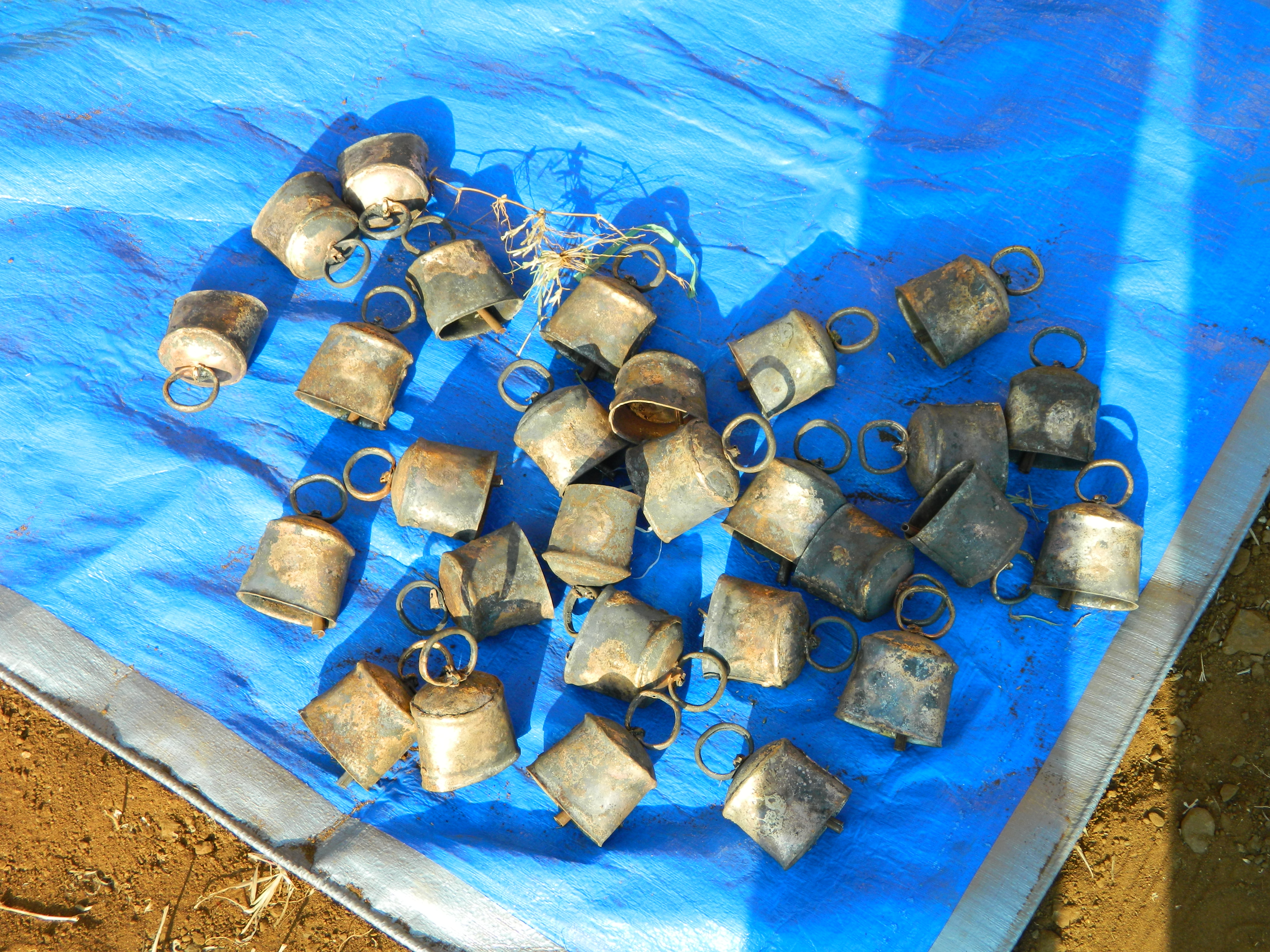 மாட்டு மணிUnknown a aesthetic copper cow bell